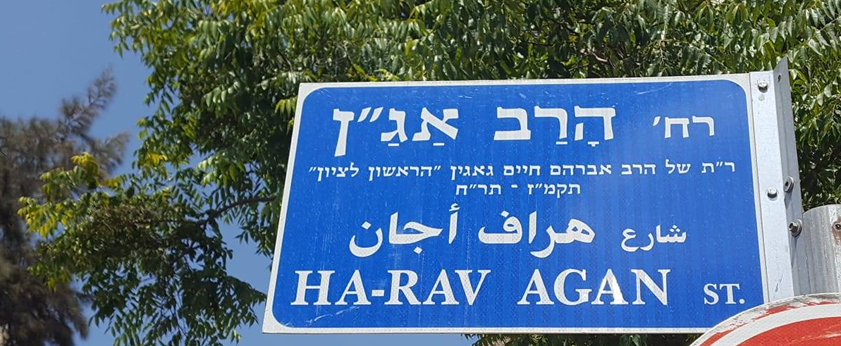 שלט רחוב הרב אג"ן בירושלים על שמו של הרב חיים אברהם גאגין הראשון לציון